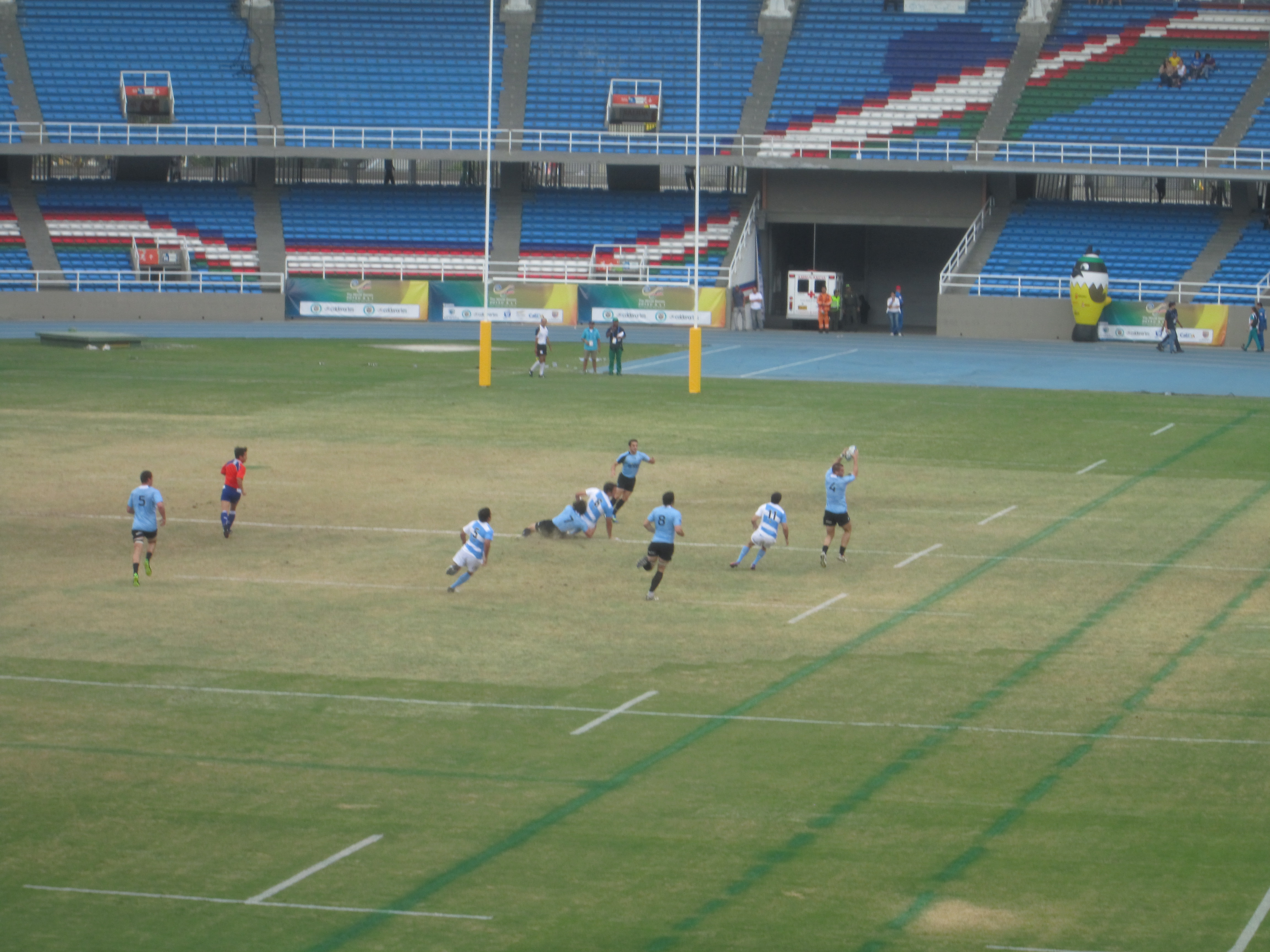 Argentina vs Uruguay - Rugby sevens - World Games 2013